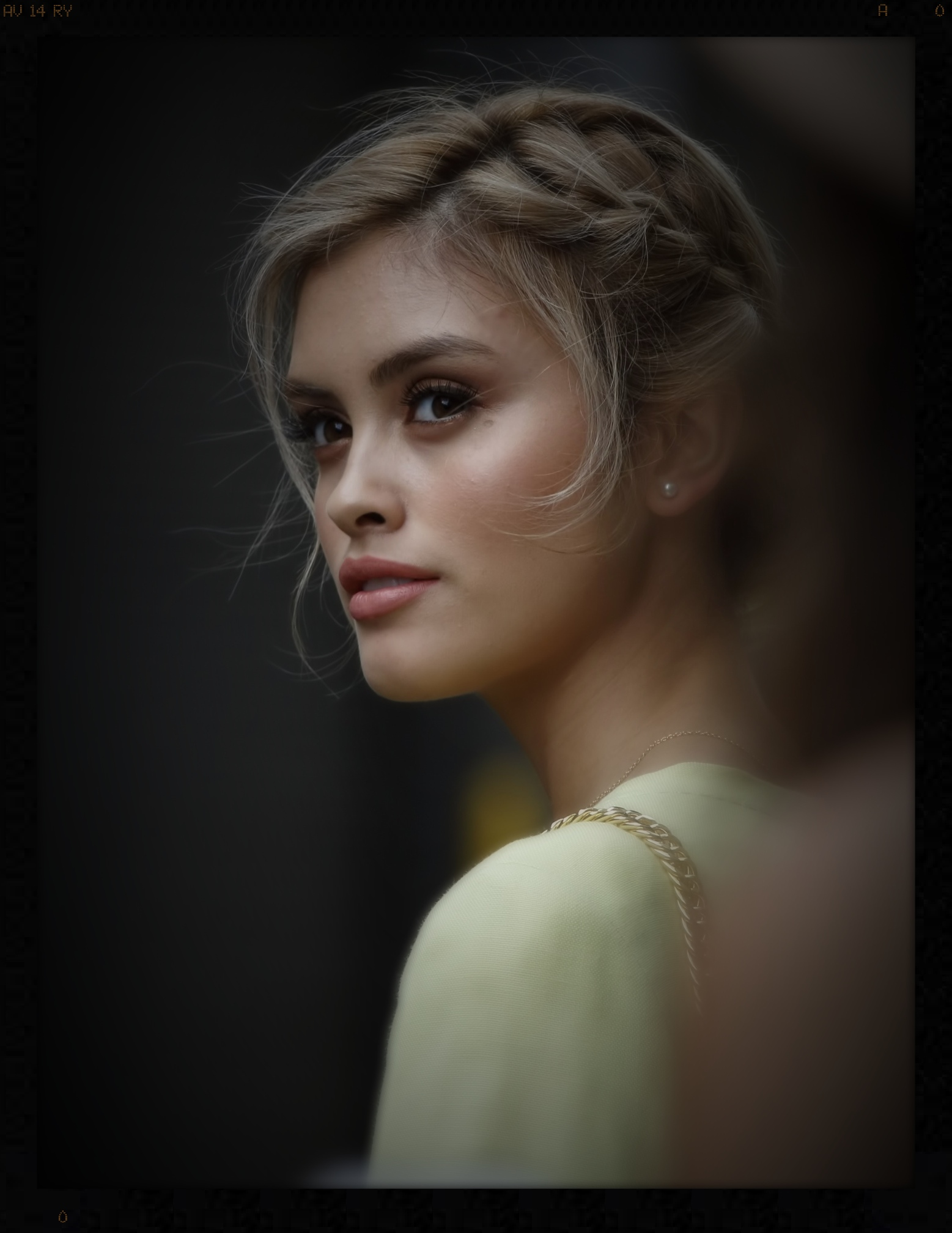 Sarah Ellen